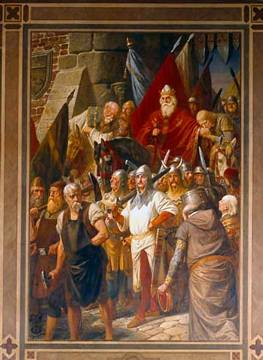 Hermann Wislicenus: Heinrich IV. in Mainz, einer der letzten ihm treuen Städte (Wandbild im Kaisersaal Goslar)